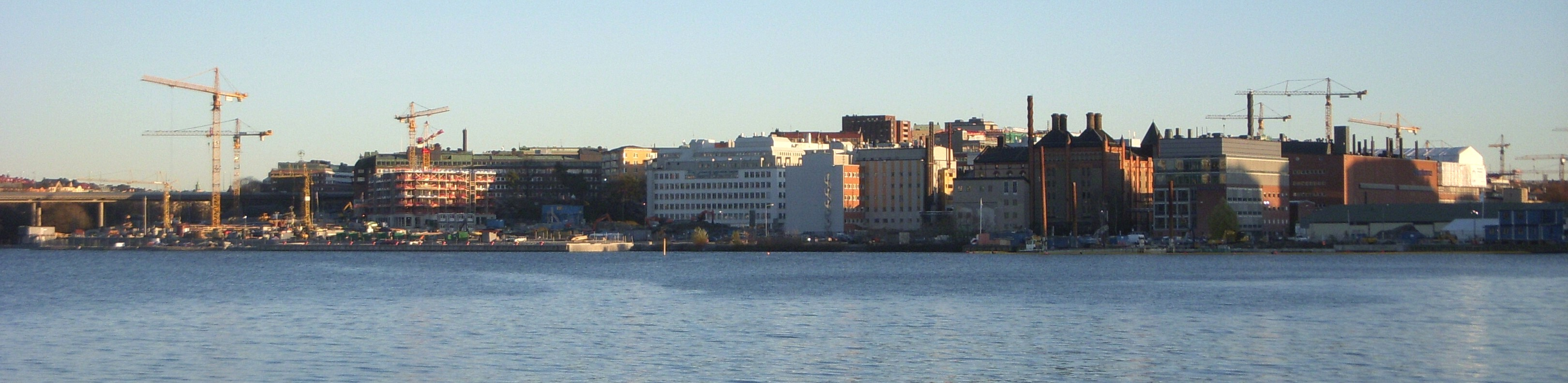 Hornsbergs strand, nya bostadsområde, Kungsholmen, Stockholm, vy från Ulvsundasjön